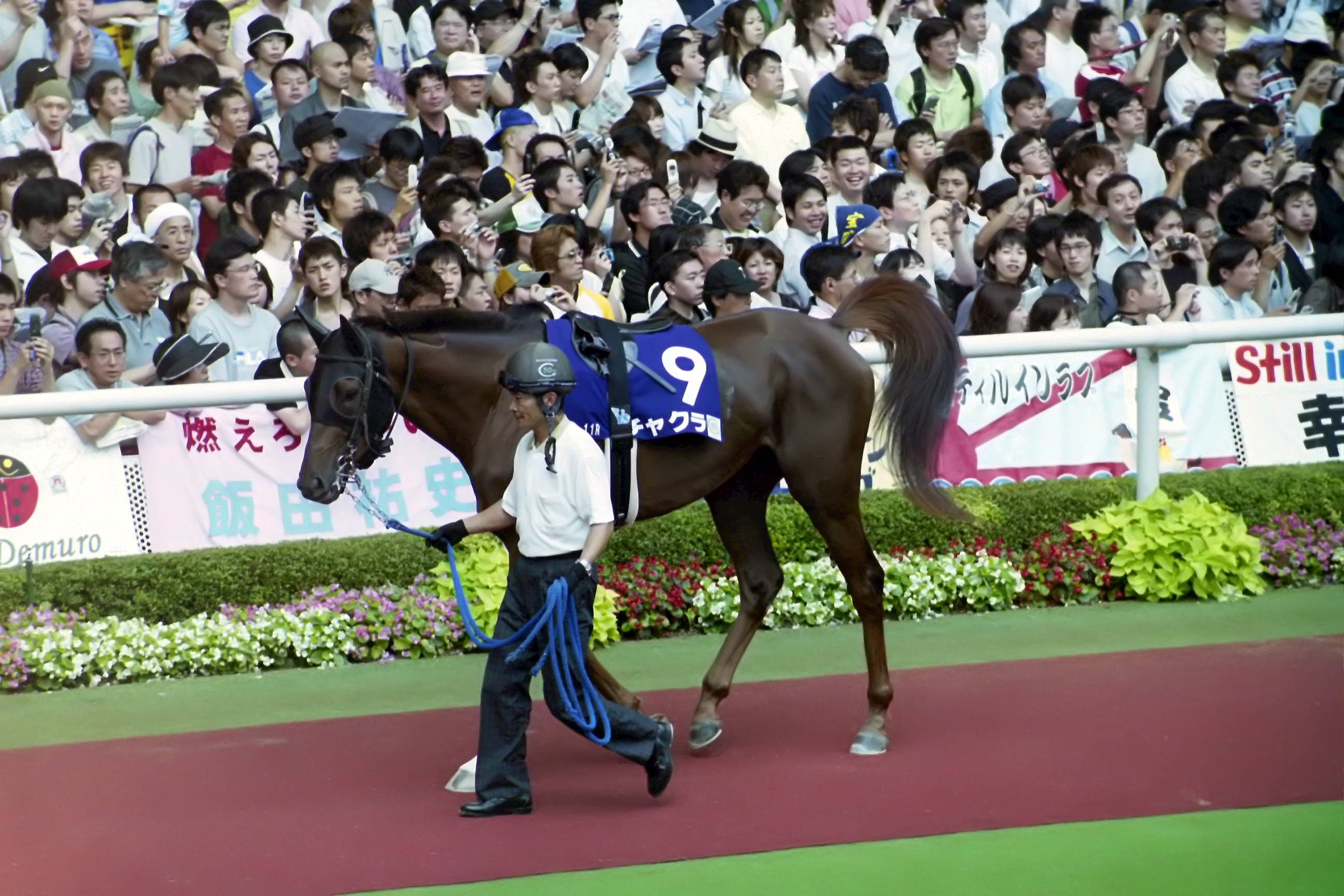 チャクラ号